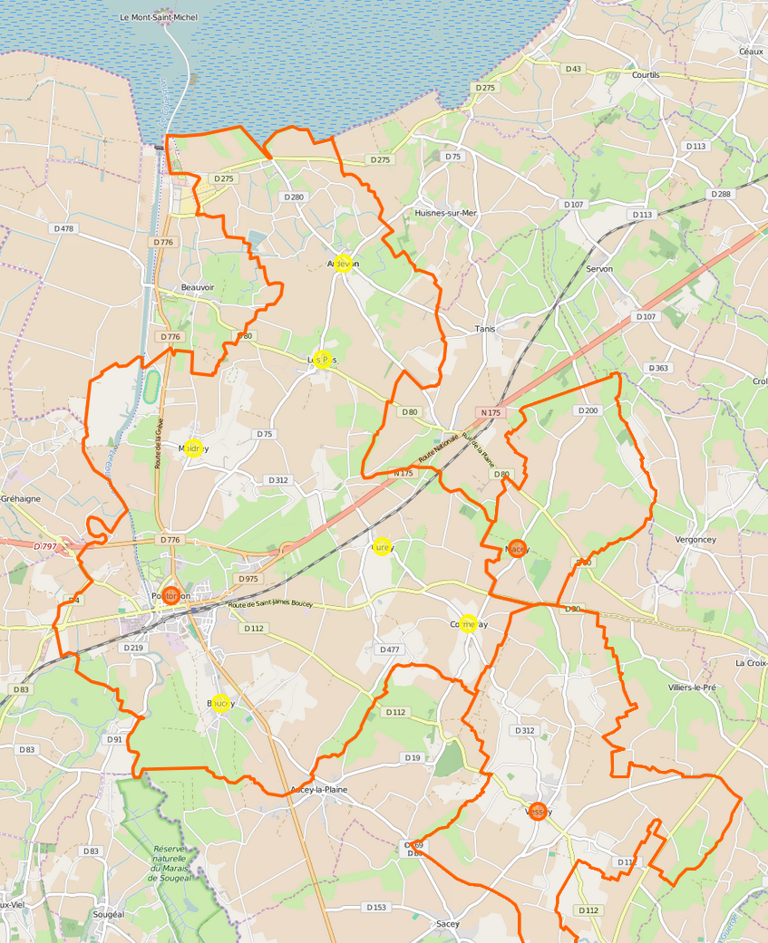 Carte de la commune nouvelle avec ses communes déléguées